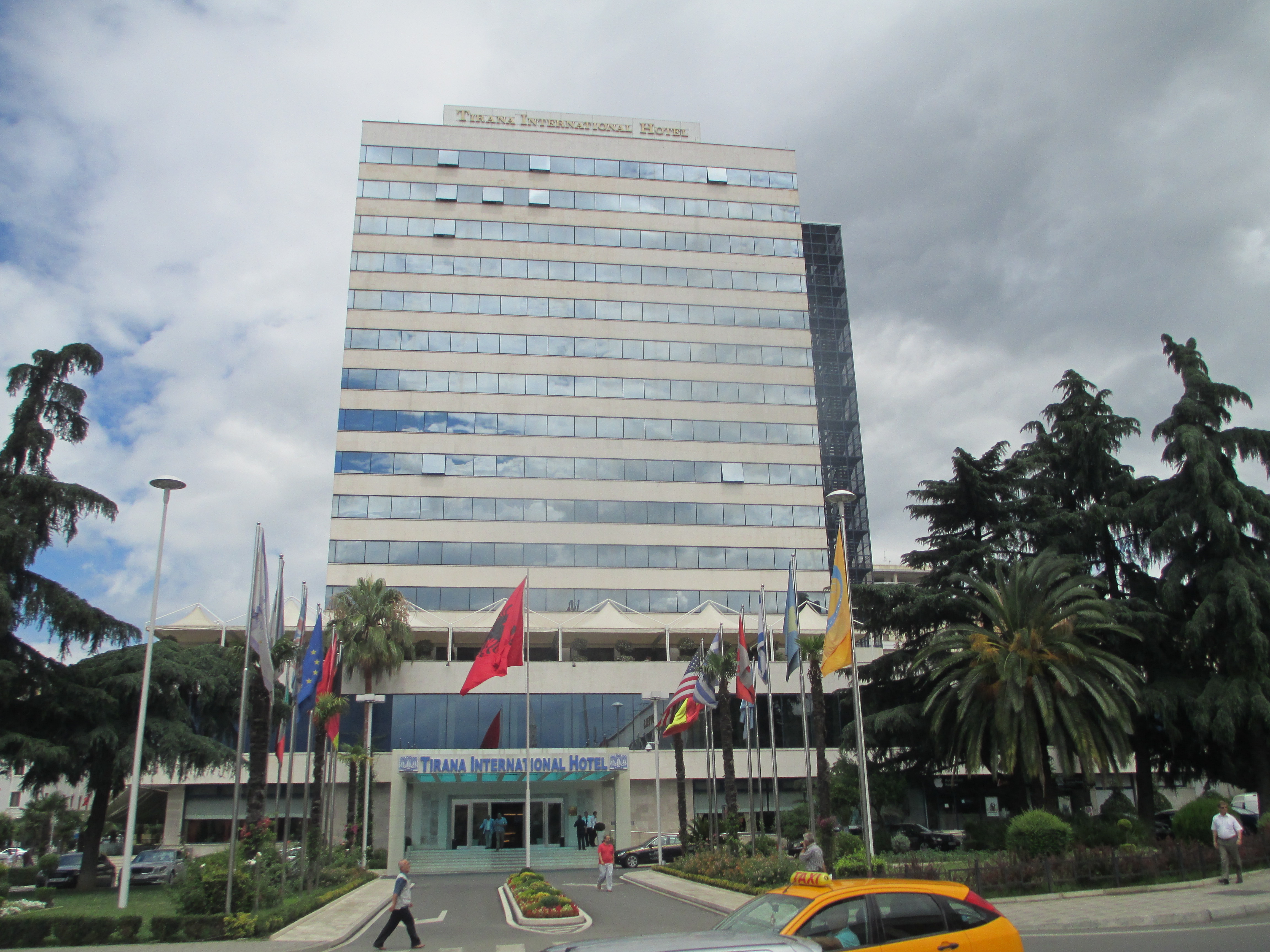 מלון טירנה אינטרנשיונל